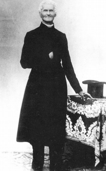 Portret Matije Vrtovca.